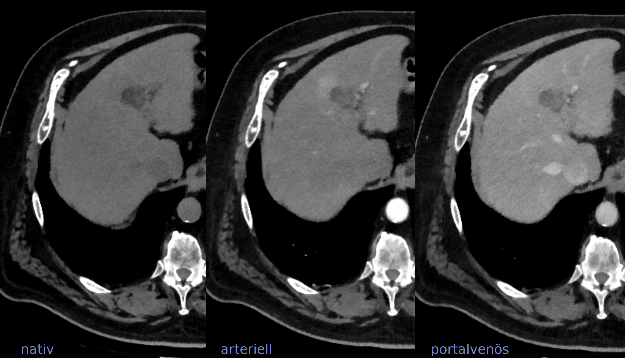 Fetthaltiges hepatozelluläres Karzinom in der Computertomographie: nativ, arterielle und portalvenöse Kontrastmittelphase. Histologisch bestätigt.